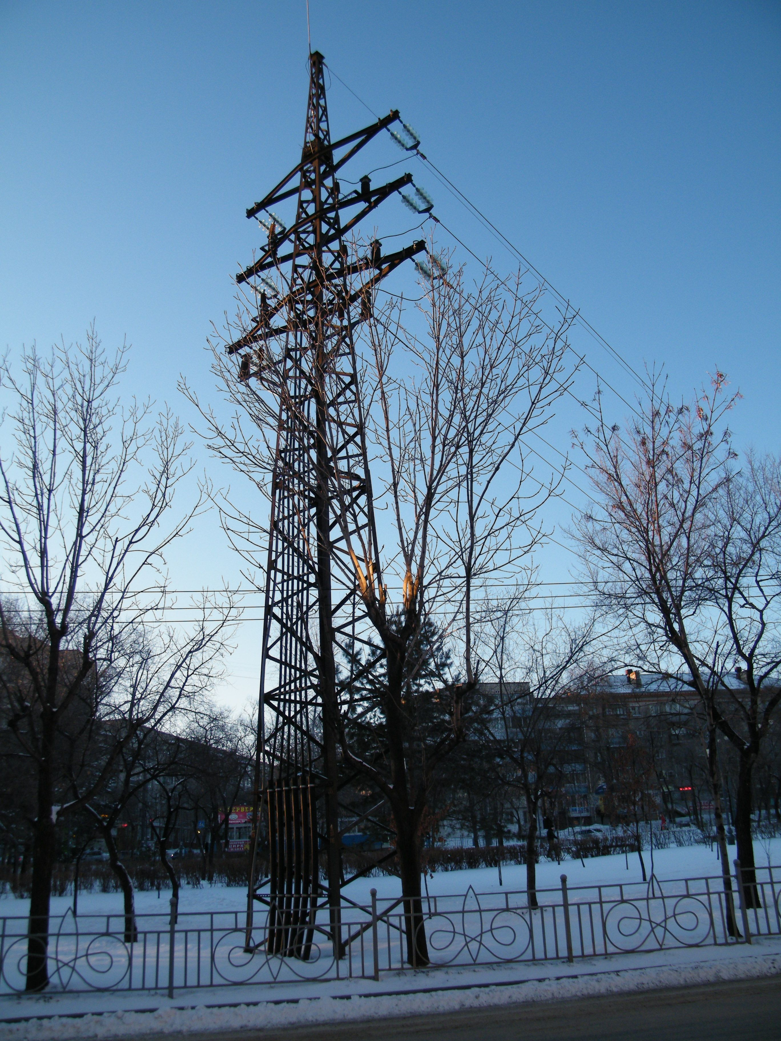 Переход воздушной ЛЭП в подземную ЛЭП Хабаровск